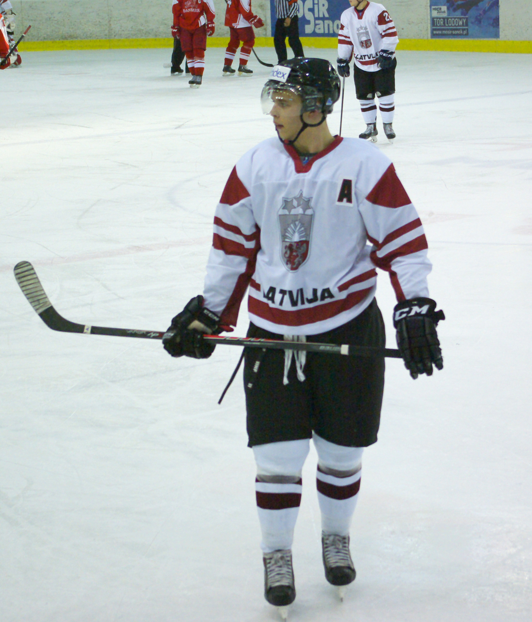 Ņikita Jevpalovs podczas Mistrzostw Świata Juniorów w Hokeju na Lodzie 2014 I Dywizji w Sanoku, Dania - Łotwa 4:1, Arena Sanok 19 grudnia 2013